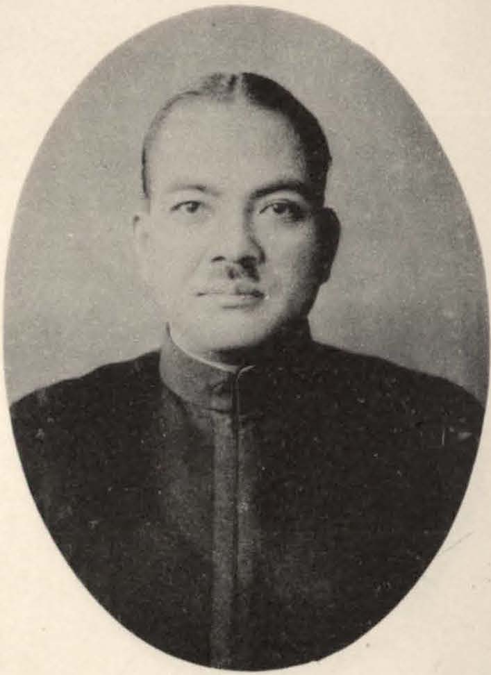 Bân-lâm-gú: 松岡一衛 Matsuoka Kazue (or Ichie?)